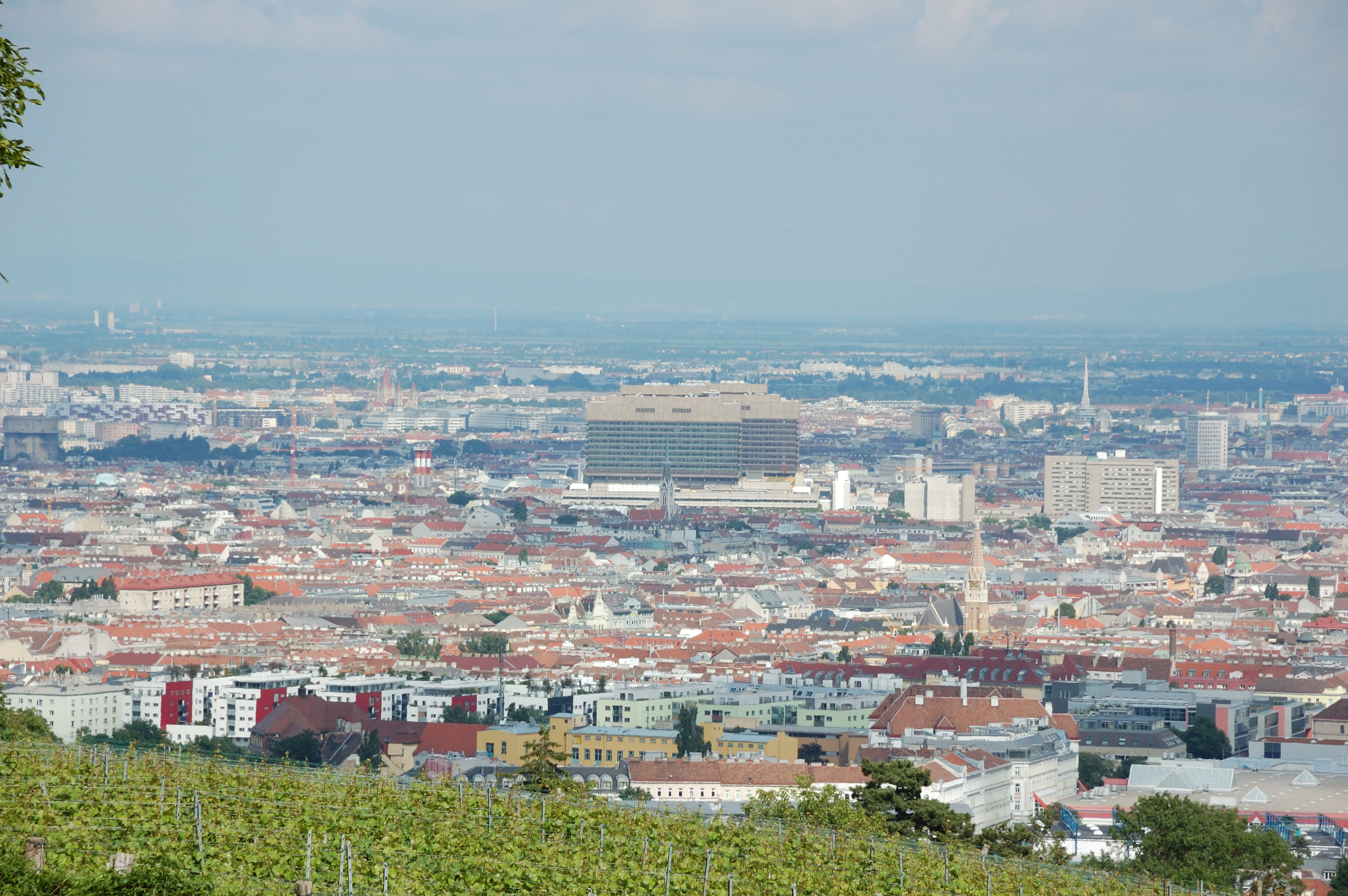 AKH Wien